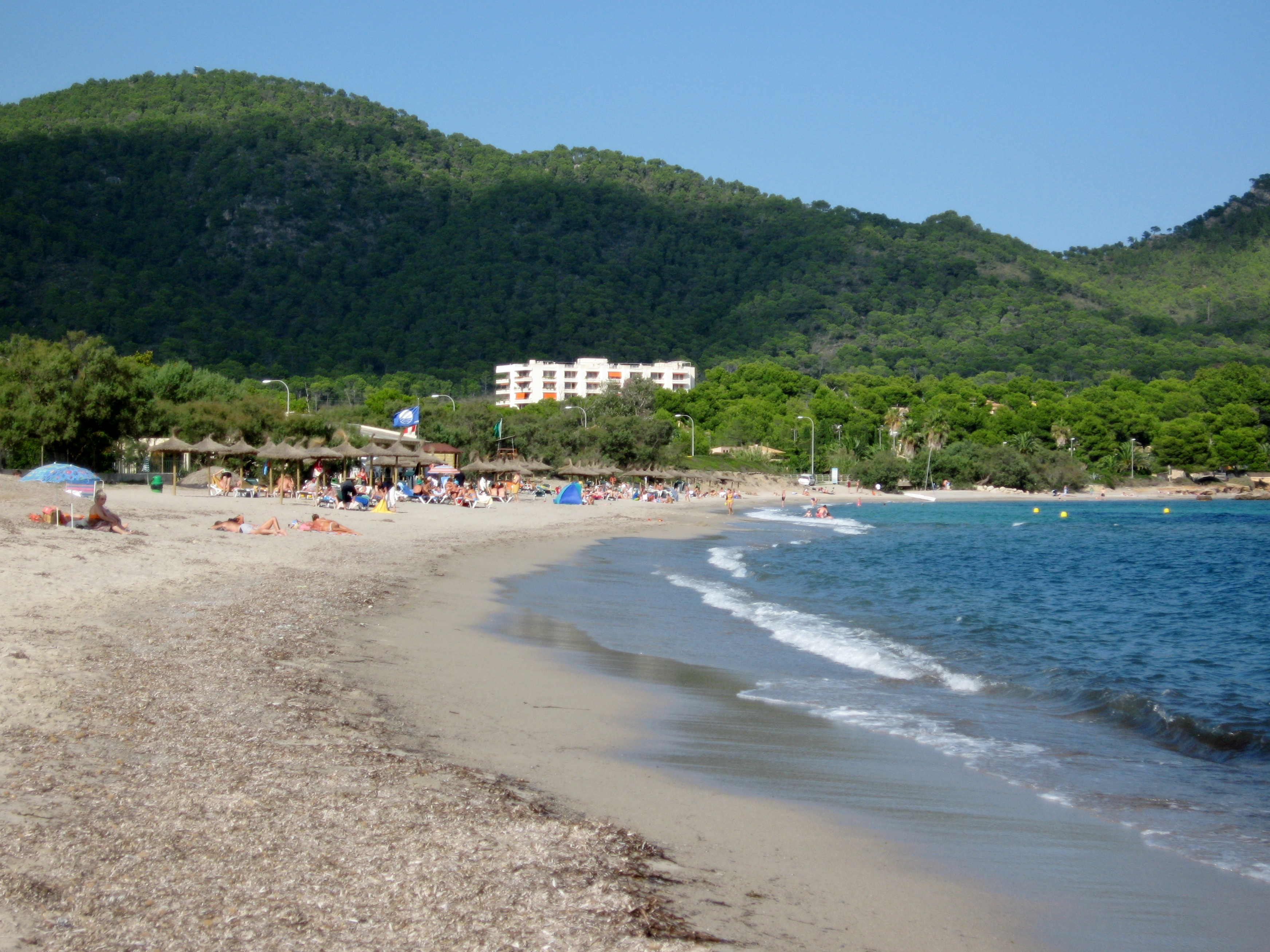 Sa Marjal, Son Servera, Mallorca, Spain